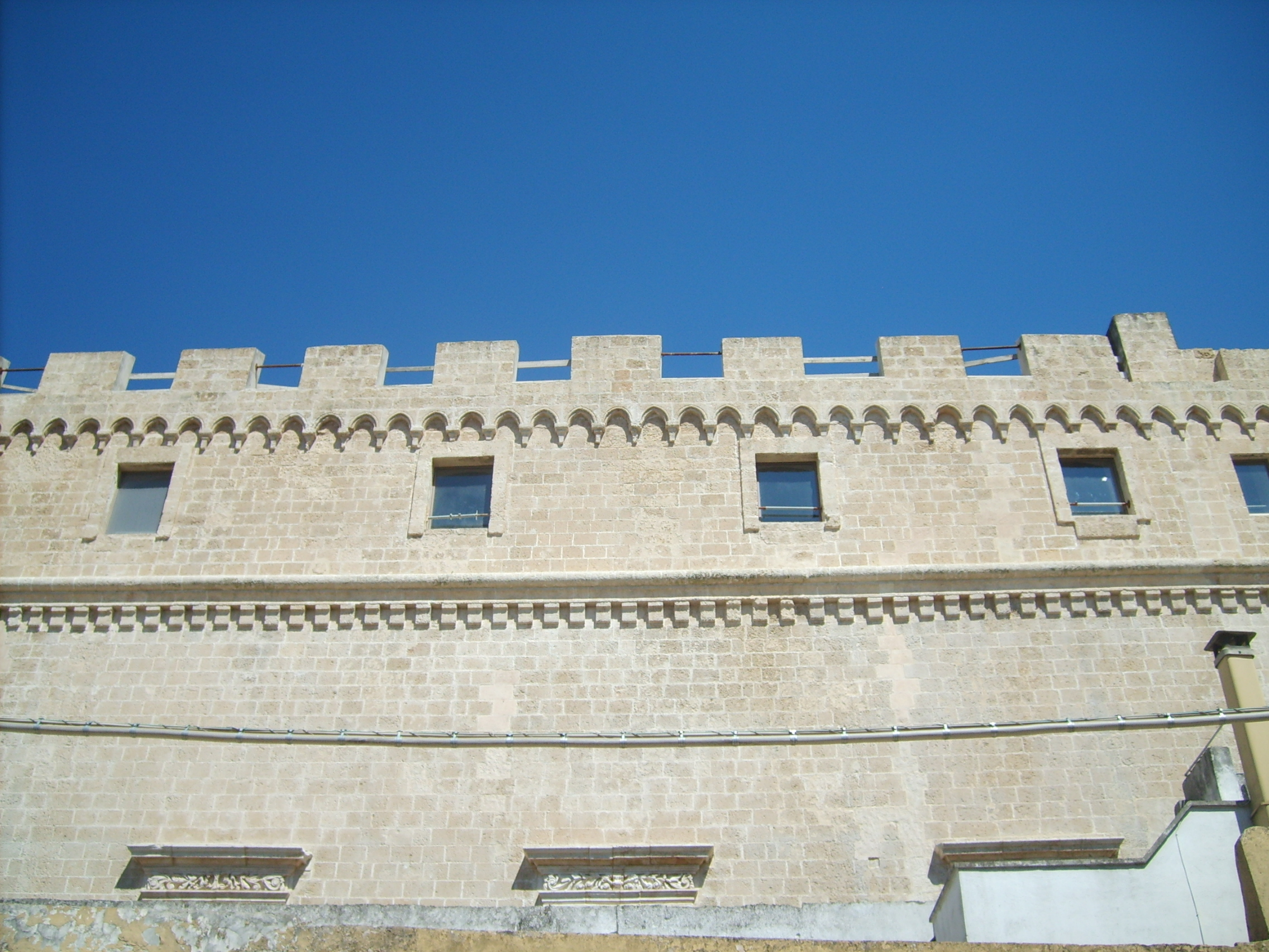 Scorcio del Castello Imperiali, a Francavilla Fontana.